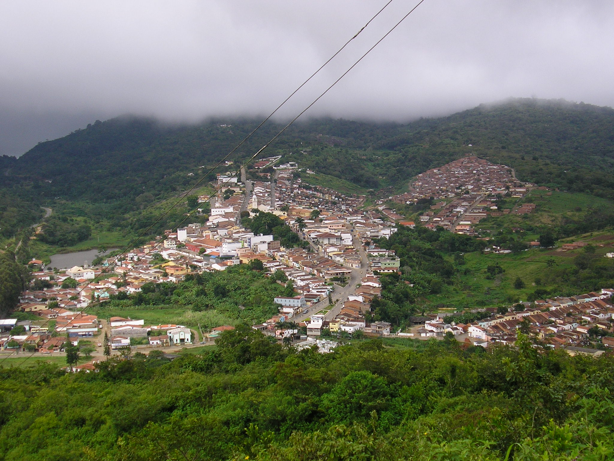 Taquaritinga do Norte vista da Serra do Cruzeiro